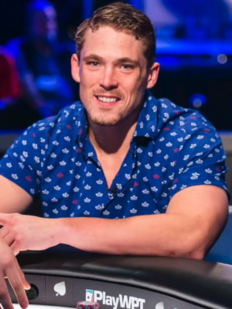 Alex Foxen beim WPT Five Diamond World Poker Classic